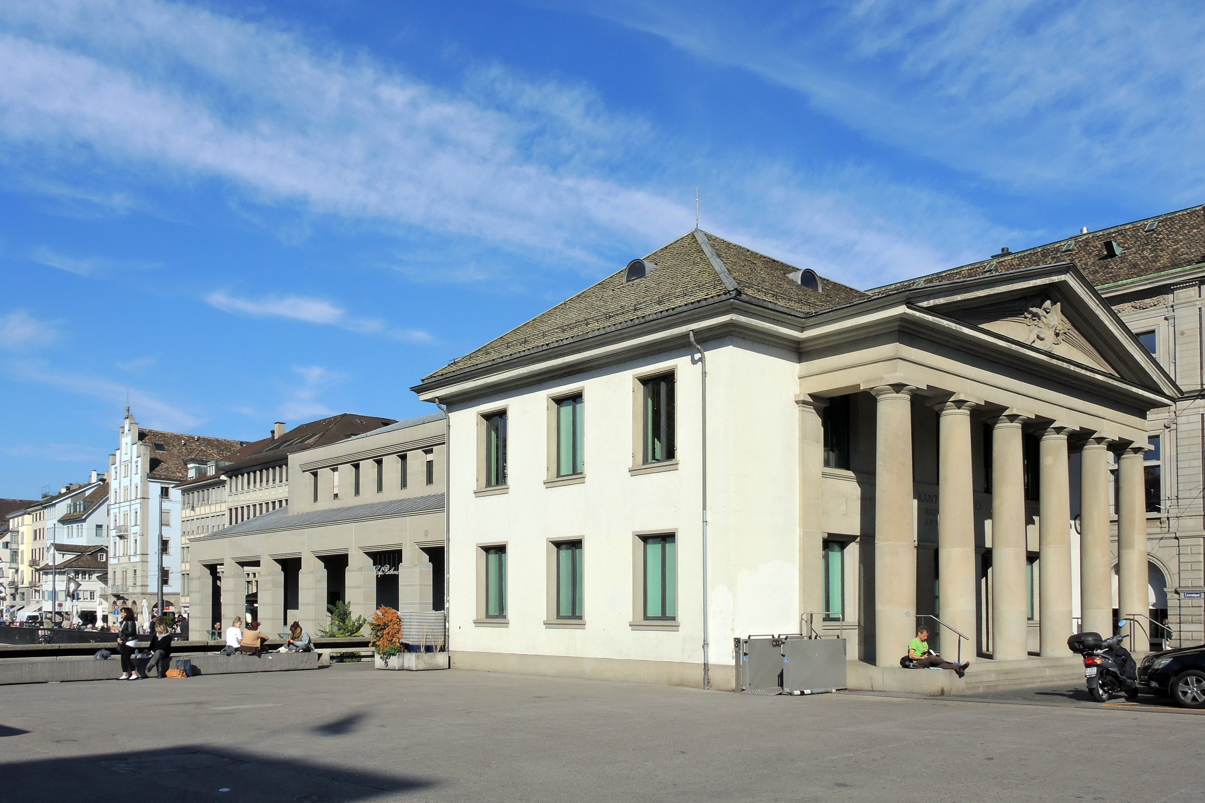 Rathausbrücke (Gmüesbrugg) and Kantonspolizei Rathausposten in Zürich (Switzerland), Limmatquai in the Bbackground.